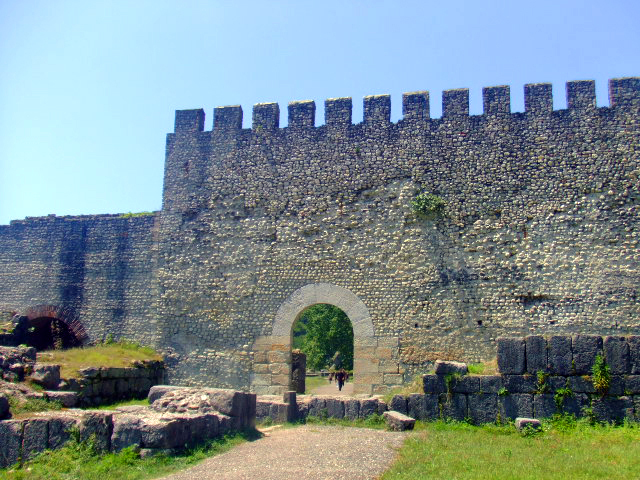 Nokalakevi